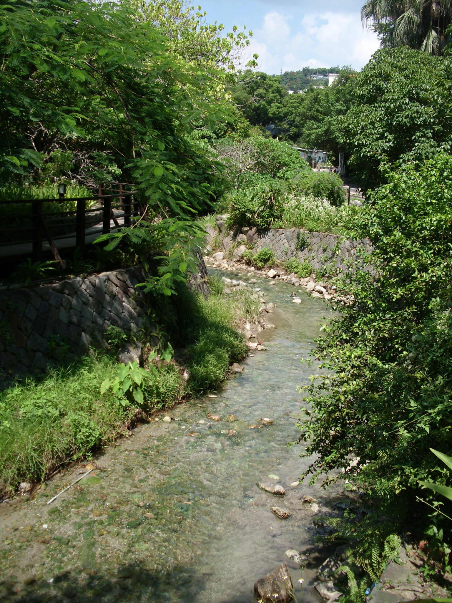 Bân-lâm-gú: 北投石自然保留區